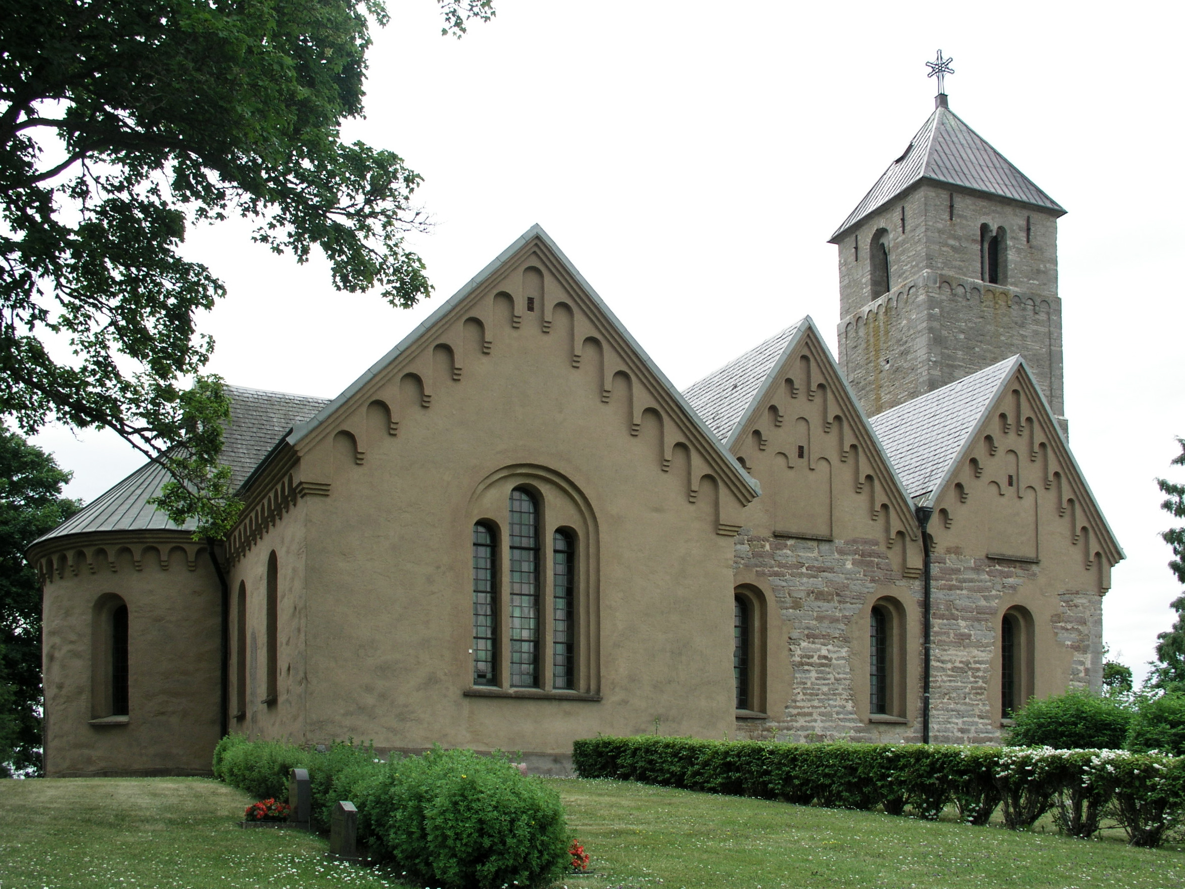 Heda kyrka, Diocese of Linköping, Ödeshögs kommun.